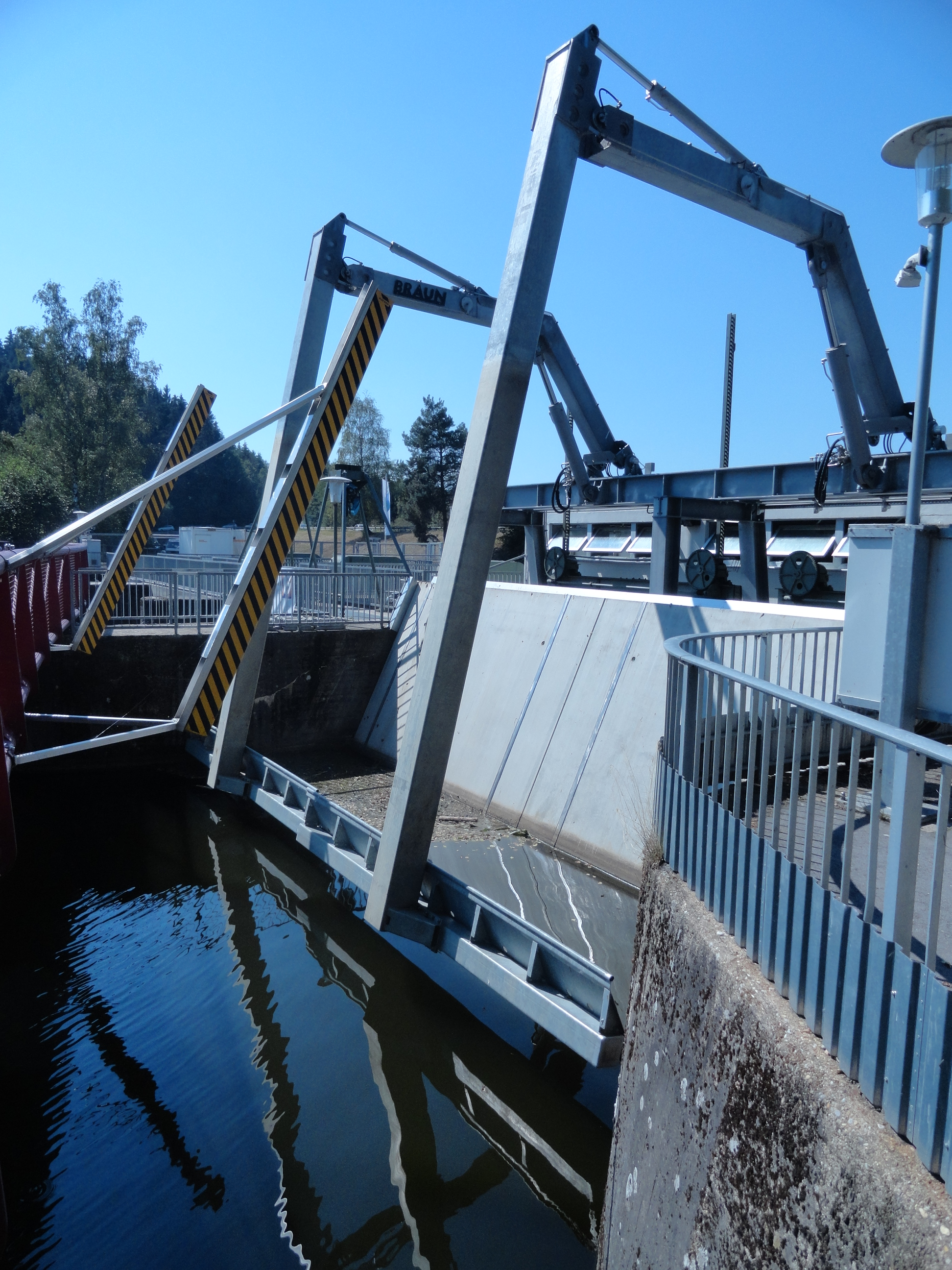 Kraftwerk Pulling; zwei hydraulische Knickarm-Rechenreinigungsmaschinen